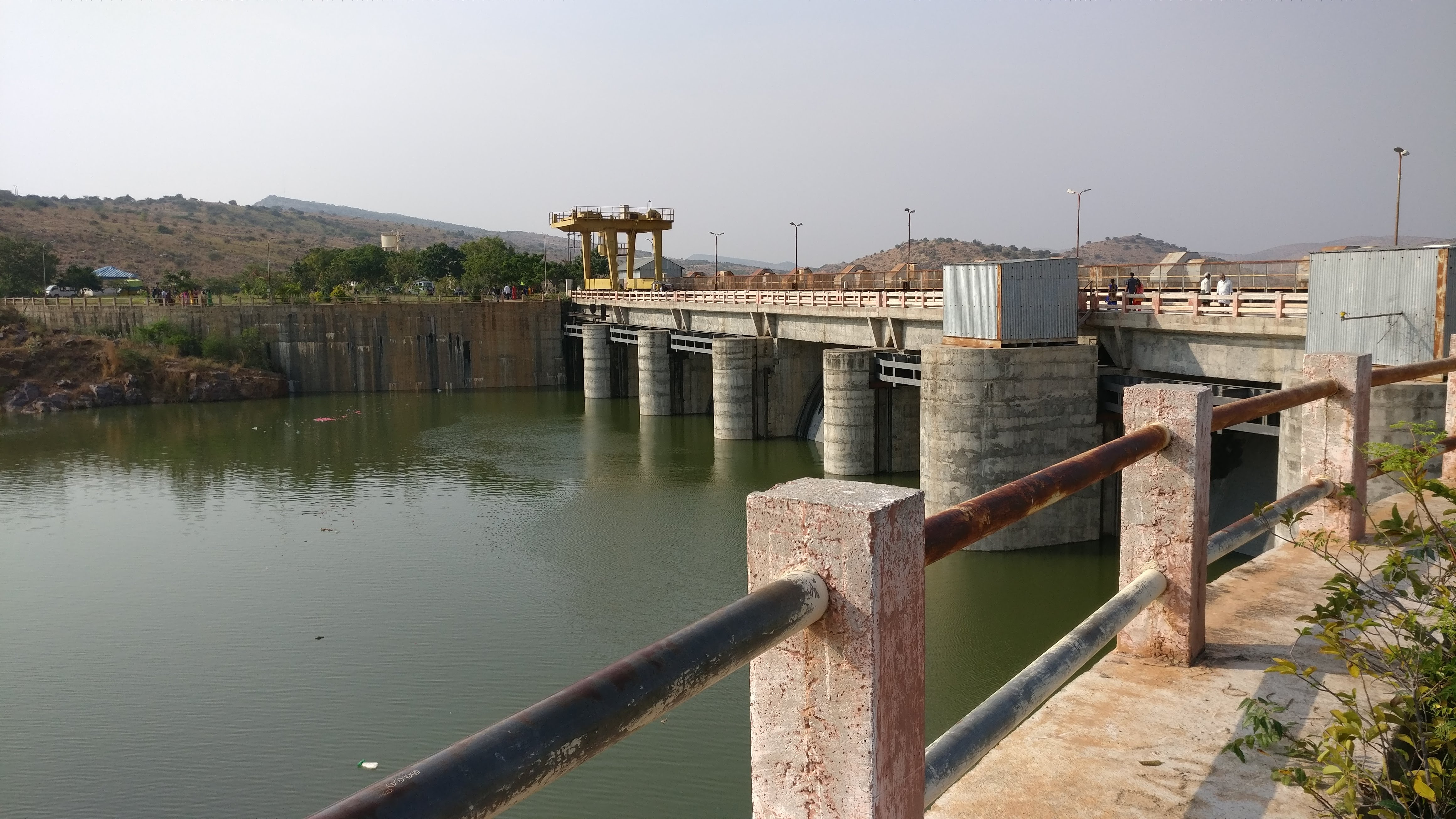 పార్నపల్లి దగ్గరి చిత్రావతి బాలన్సింగ్ రిజర్వాయర్ (జనవరి 15, 2018)